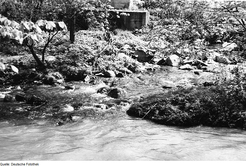 Original image description from the Deutsche FotothekTriebischtal-Robschütz. Zusammenfluß von kleiner Triebisch und Triebisch hinter der unteren Robschützer Papierfabrik